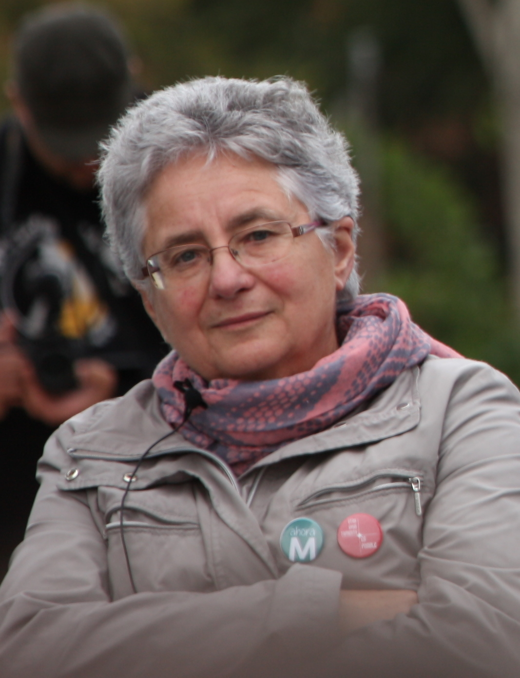 Tetuán 6 David Arenal